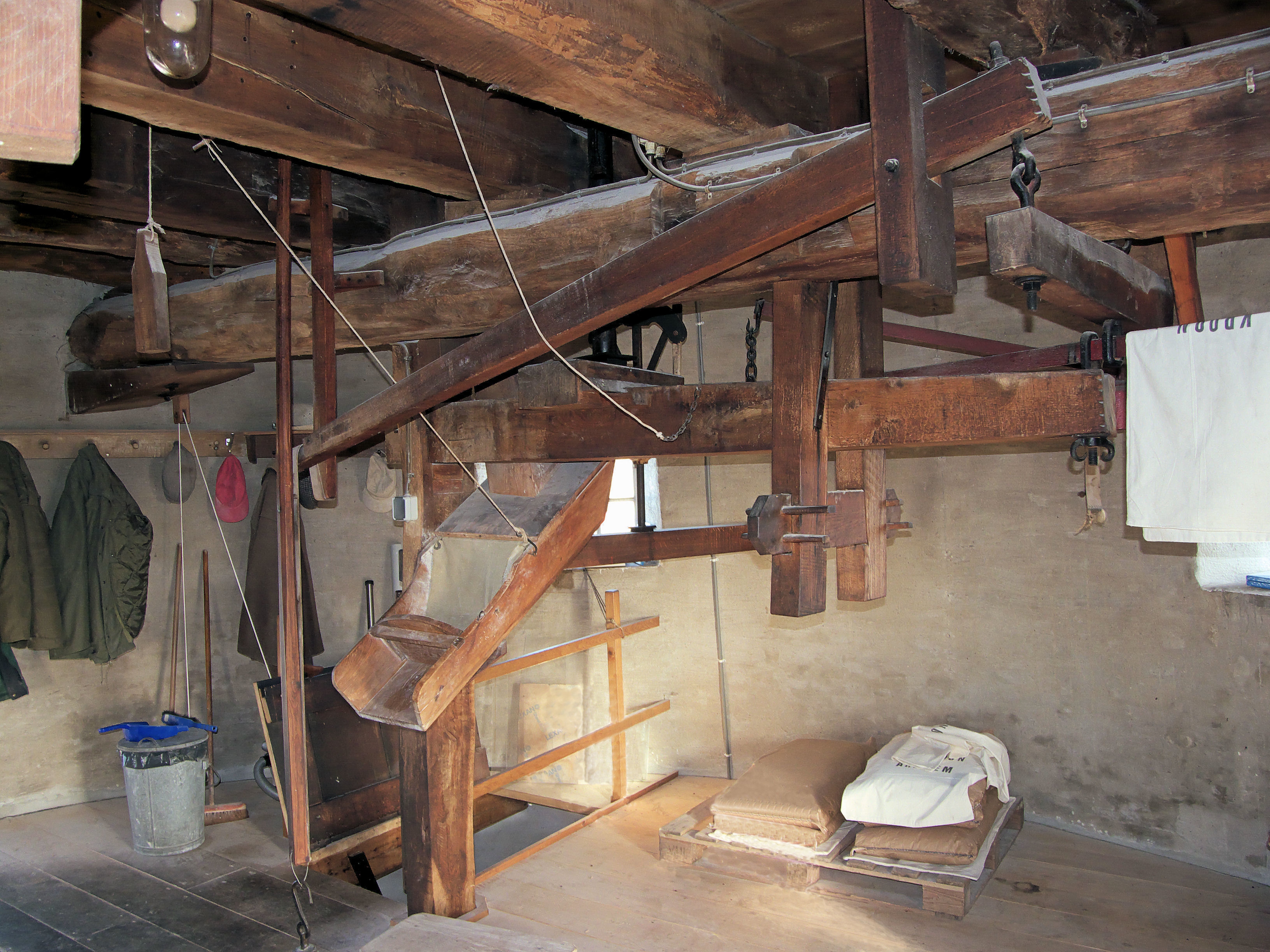 Molen De Kroon Arnhem paard van maalkoppel blauwe steen